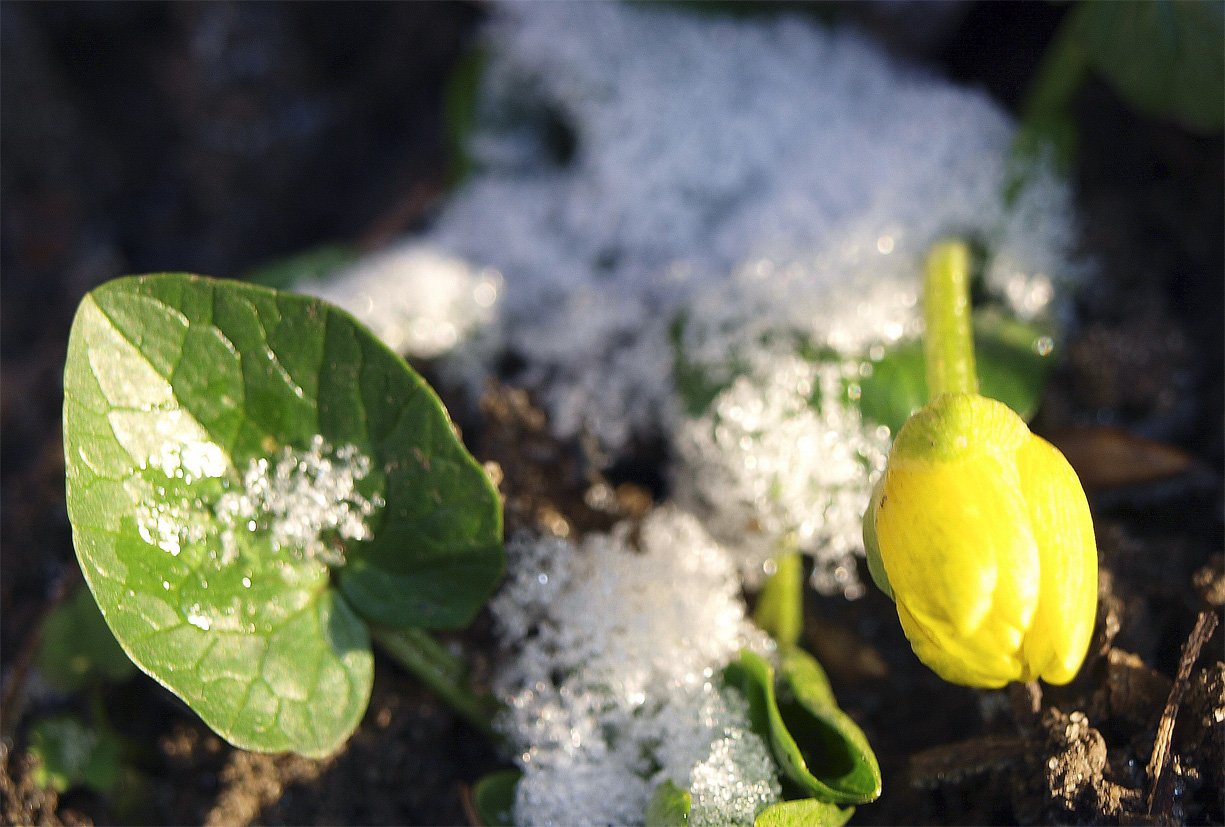 аномалія: квітка (Ficaria verna) зацвіла 31 грудня 2010 р. (Луганськ, Україна)